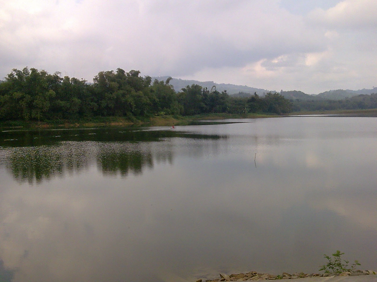 Waduk Tempuran di Desa Tempuran